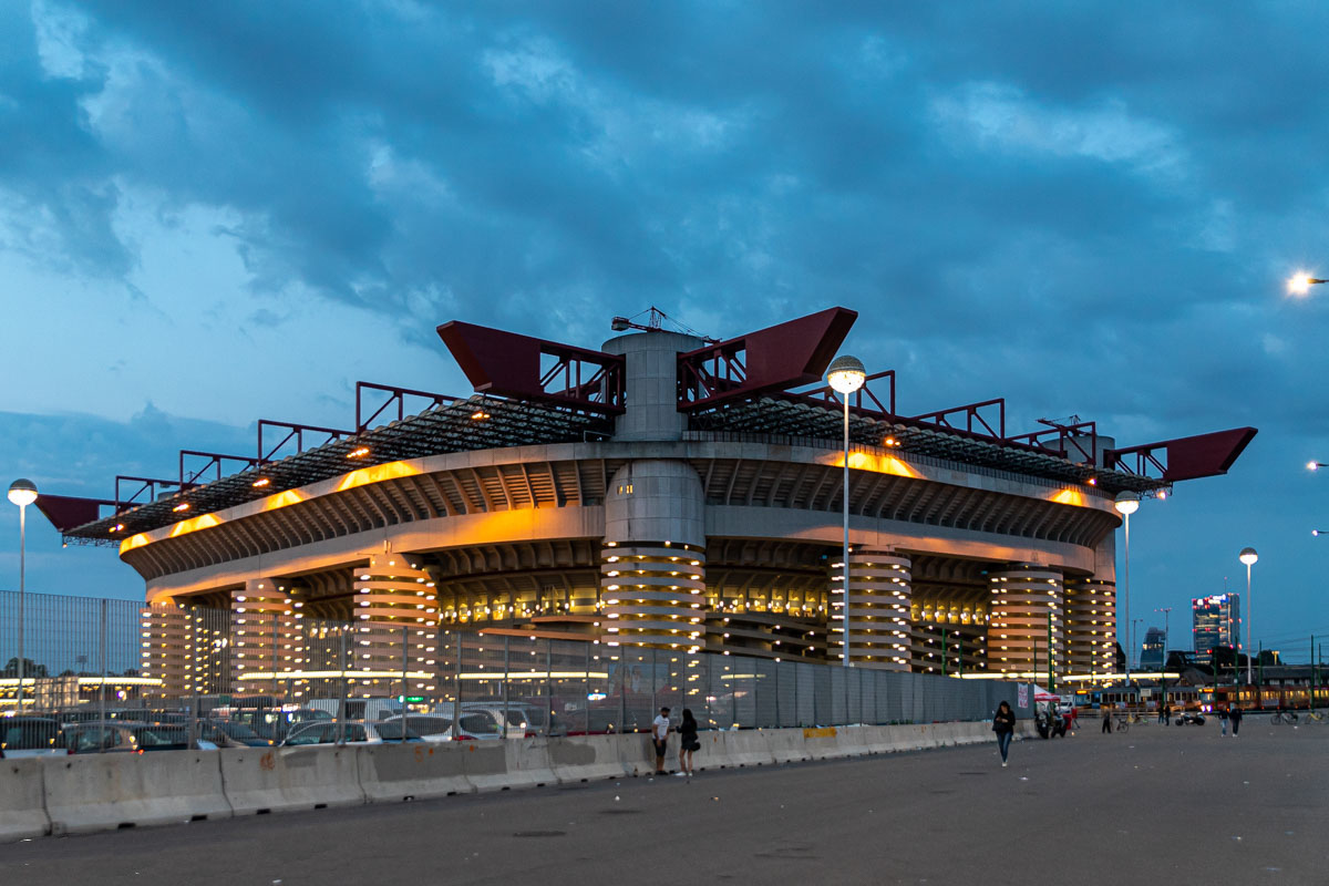 Stadio San Siro ID 03F2050070 This is a photo of a monument which is part of cultural heritage of Italy.